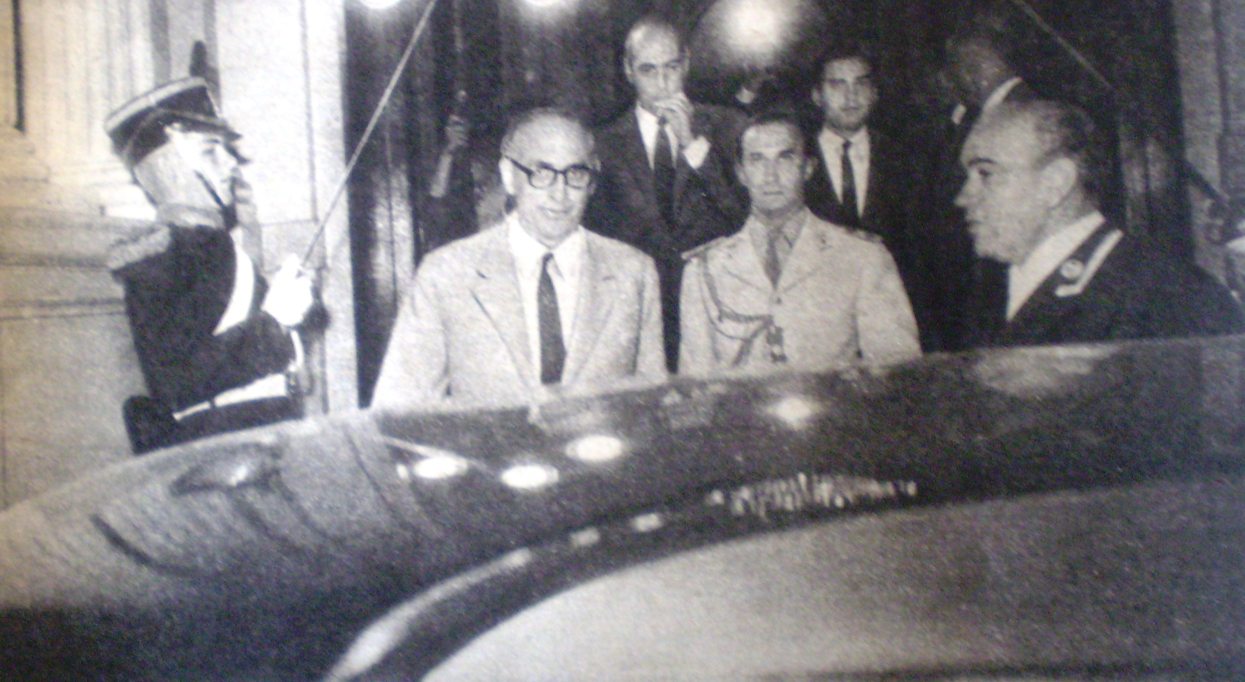 El presidente Arturo Frondizi deja por última vez la Casa de Gobierno en la tarde del 28 de marzo de 1962. Las FFAA habrían de deponerlo al día siguiente.